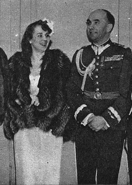 Zofia Kajzerówna i Tadeusz Kasprzycki podczas karnawału 1939